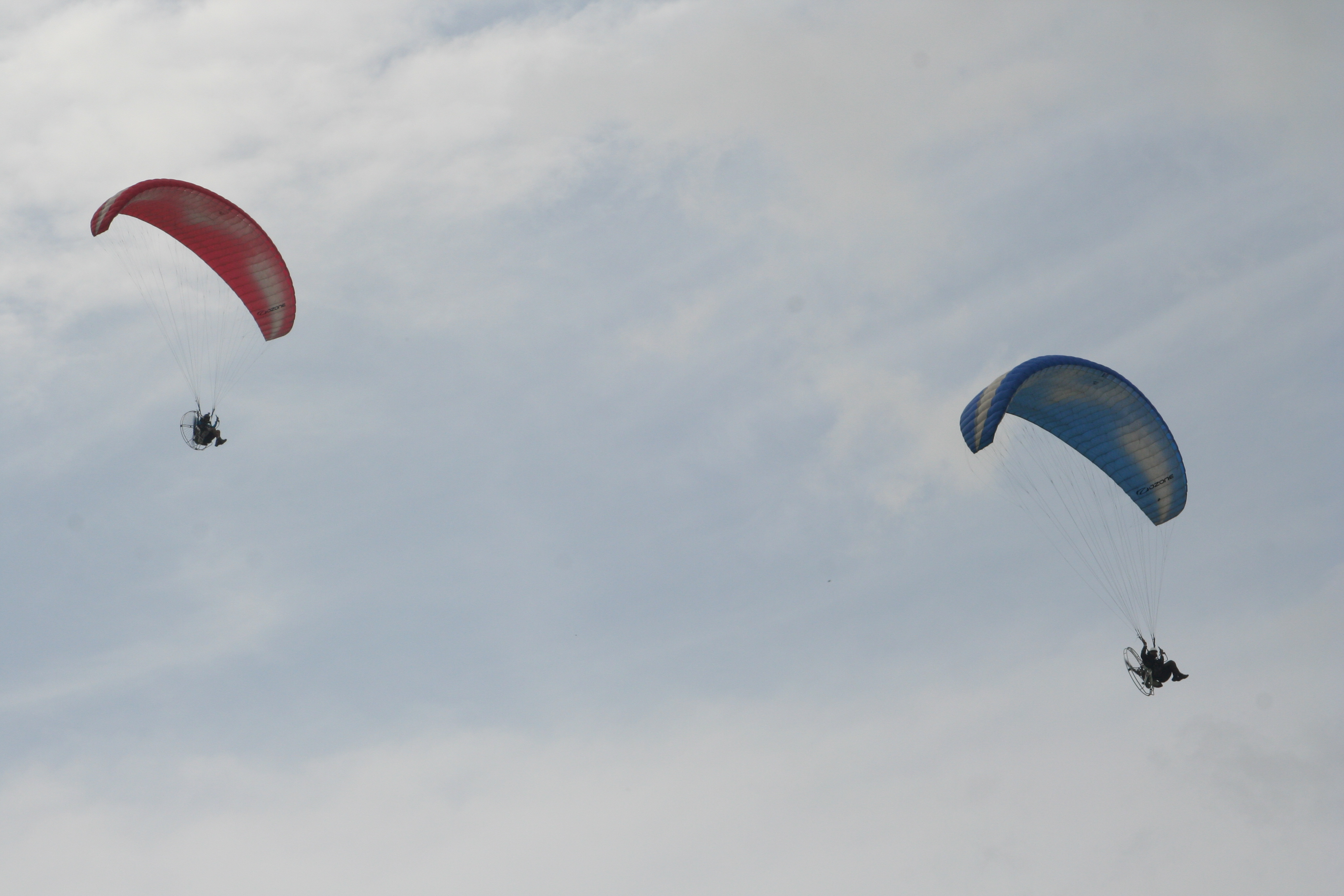 Biểu diễn bay paramotor (2011, Biên Hòa, Việt Nam)